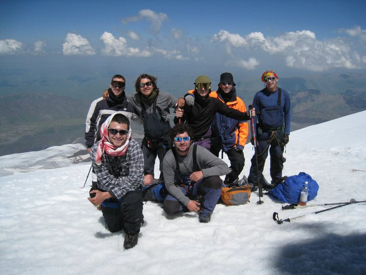 חברי המשלחת הישראלית שטיפסו על פסגת האלברוס ב-2010